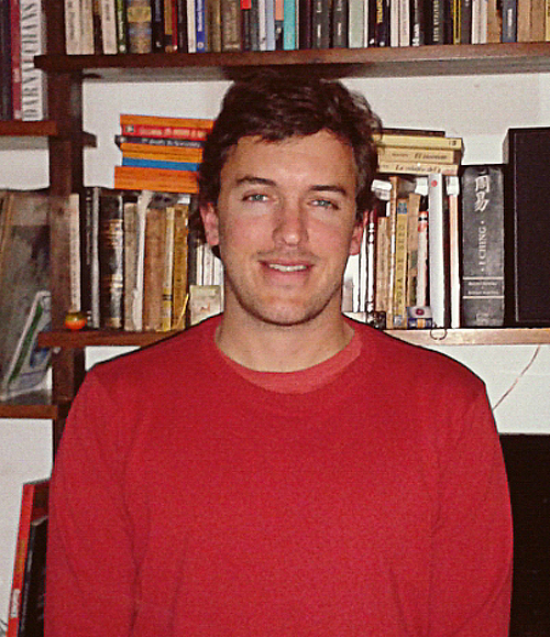 Daniel Baldi deportista, entrenador y escritor uruguayo.